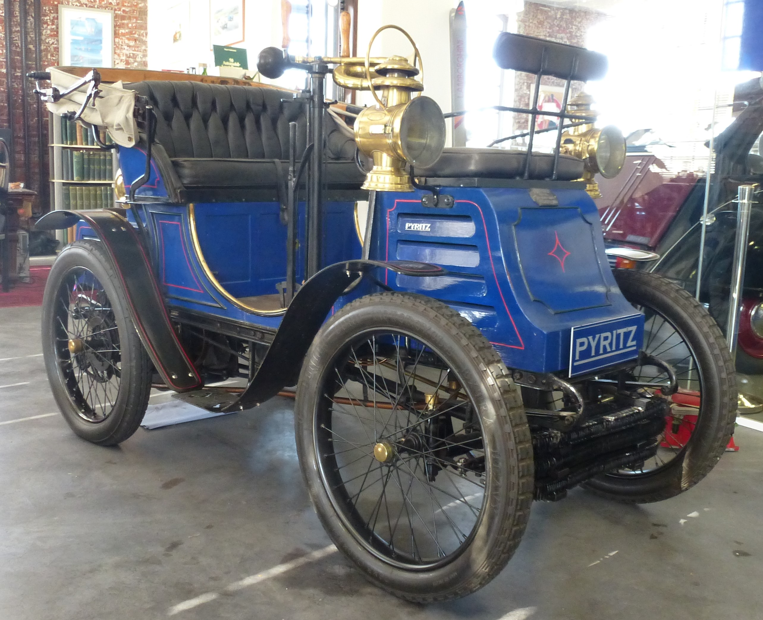 Boursaud 1899